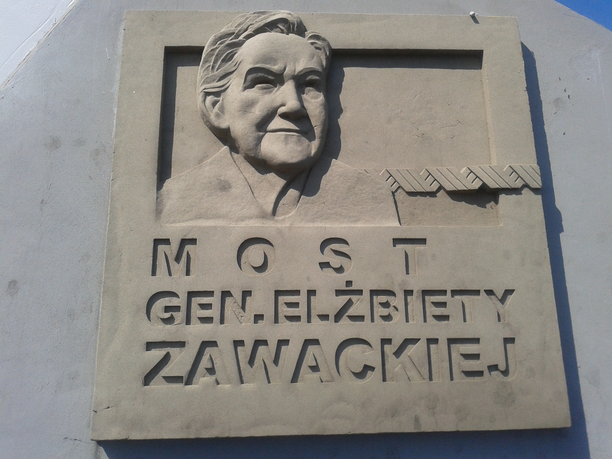 Tablica "Most Generał Elżbiety Zawackiej" znajdująca się na początku pierwszego prawego łuku Mostu drogowego im. Elżbiety Zawackiej jadąc od części prawobrzeżnego Torunia